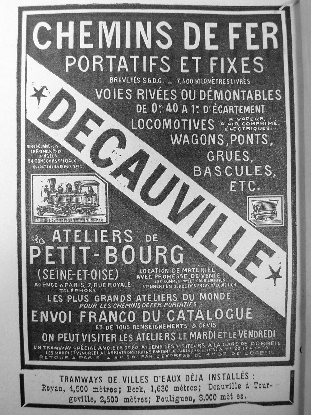 Publicité Decauville parue dans Victor Billaud, Royan et ses environs, guide du touriste, Victor Billaud Editeur, Royan, 1890, p. lxxxiv. Noter la référence aux « tramways de villes d’eaux déjà installés ».